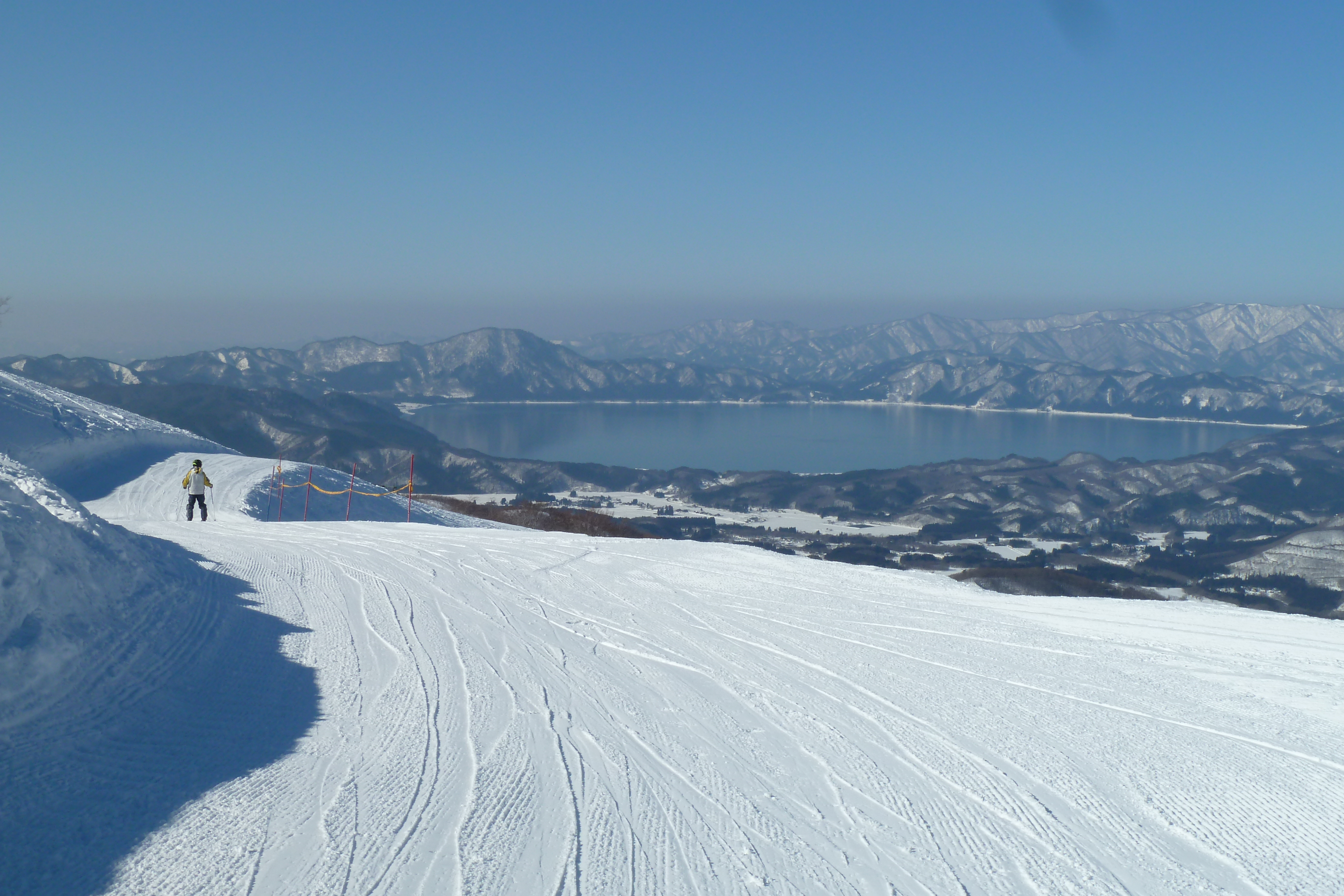 たざわ湖スキー場から田沢湖